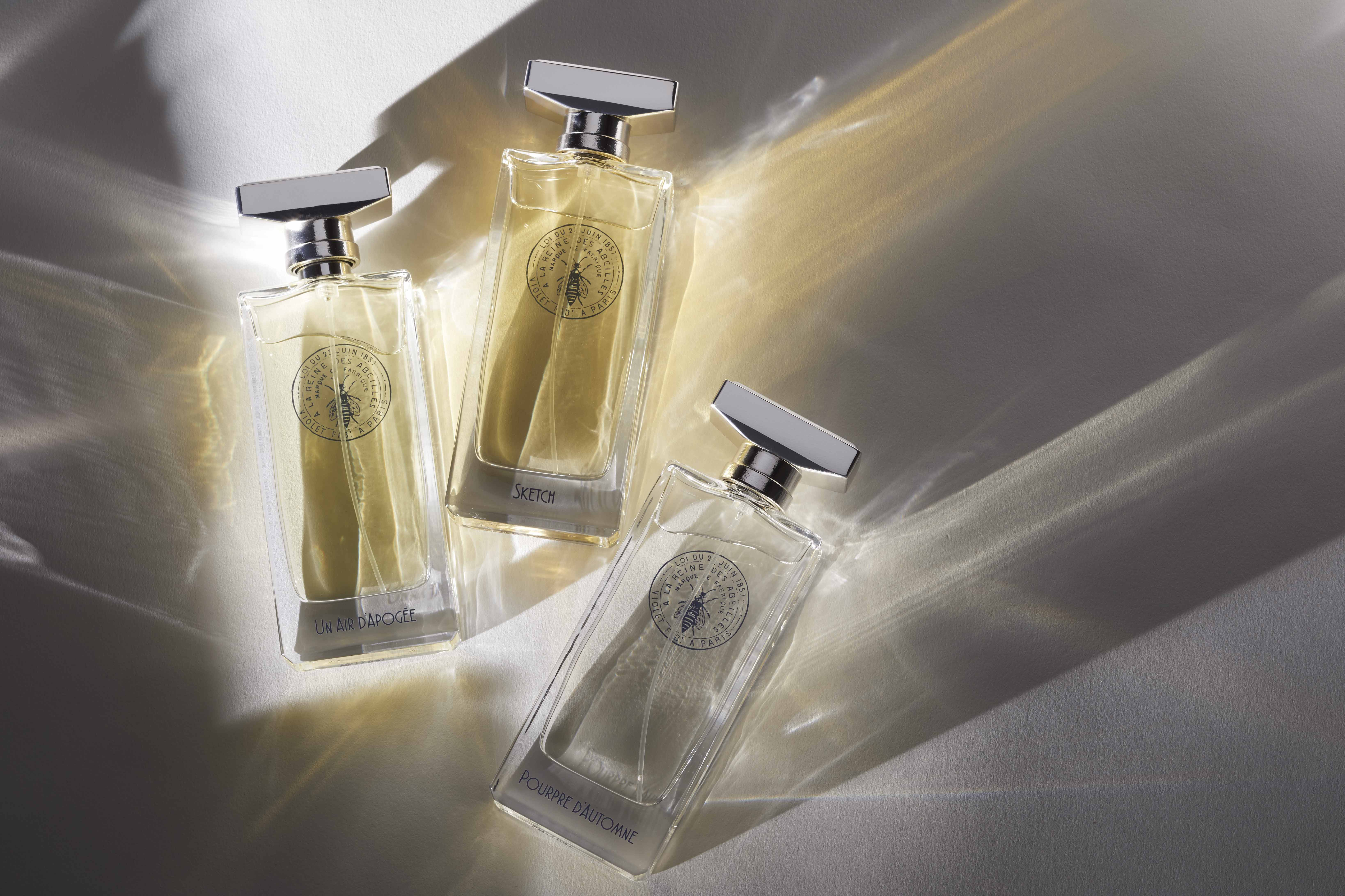 Flacons de parfums de la maison Violet